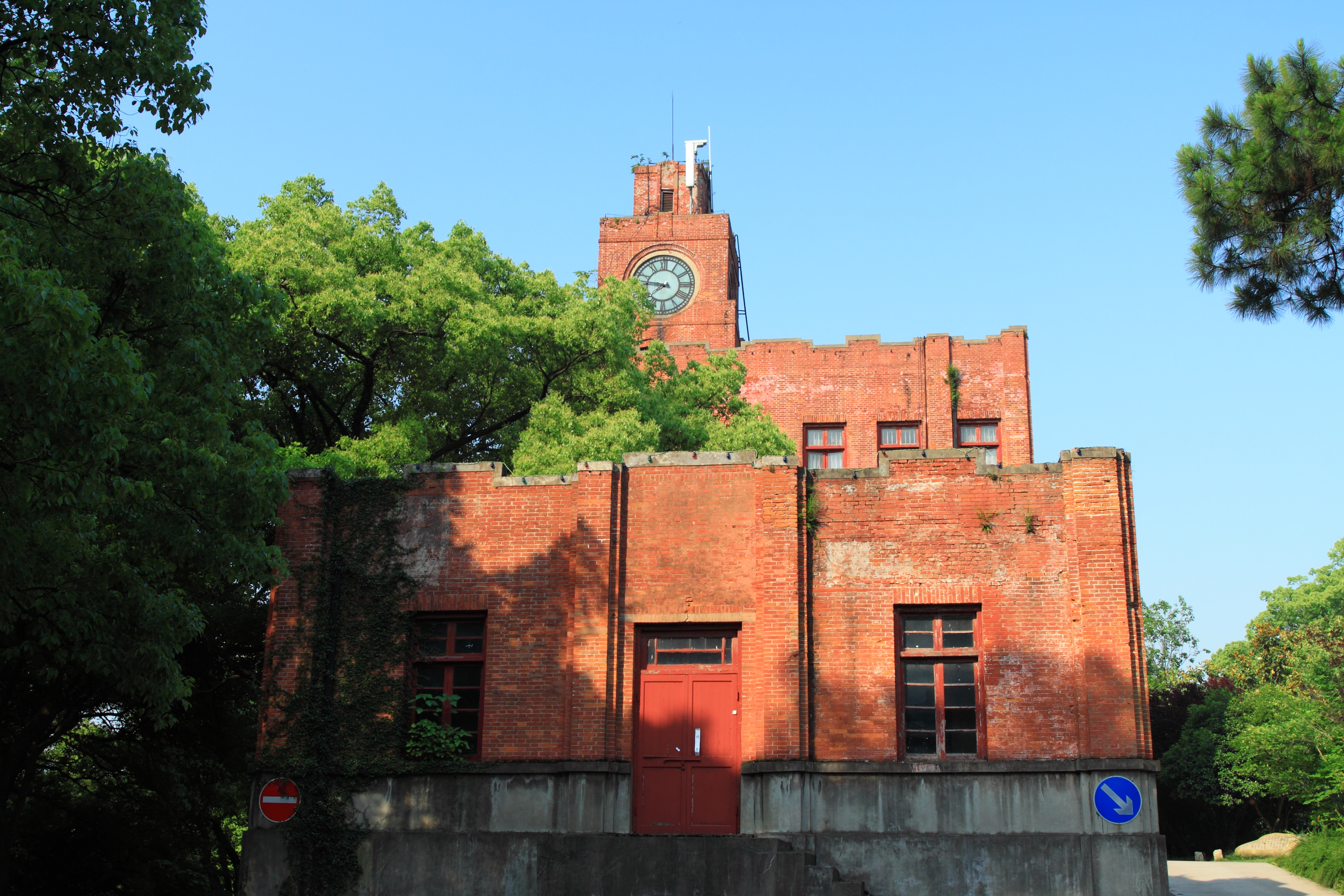 之江大学旧址钟楼，位于中国浙江省杭州市。